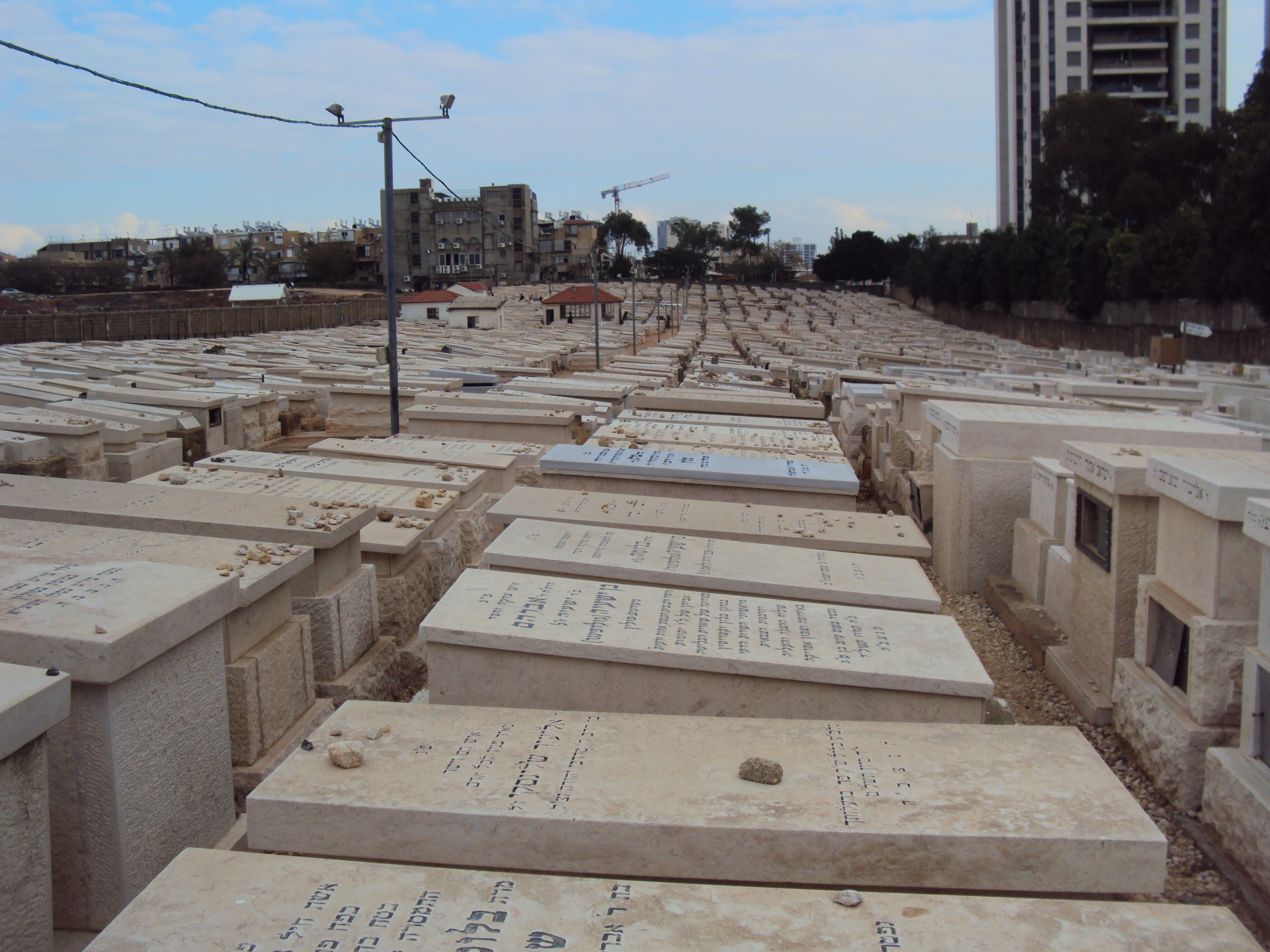 בית הקברות שומרי שבת, זכרון מאיר, בני ברק